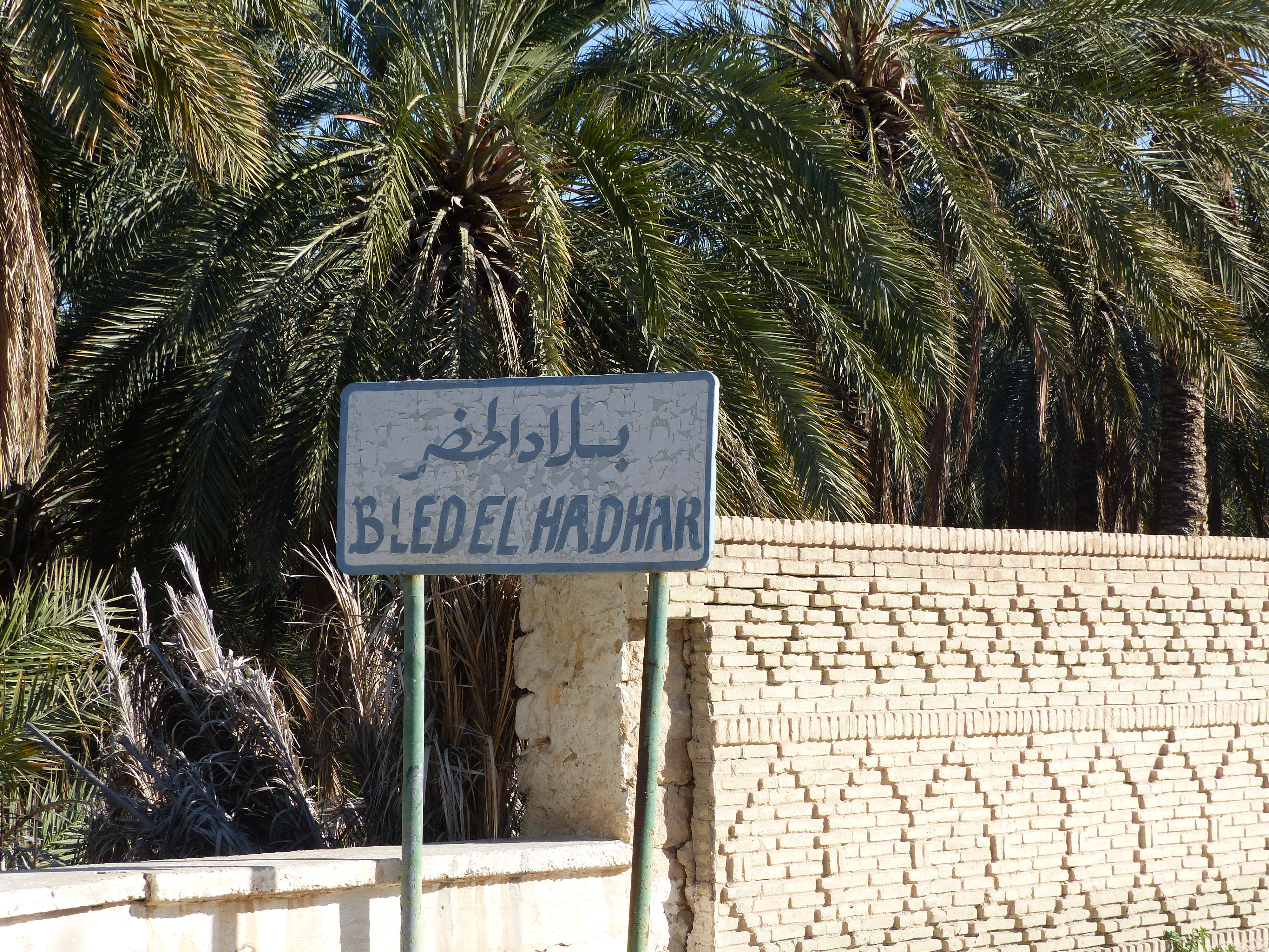 Hameau de Bled el Hadhar, près de Tozeur